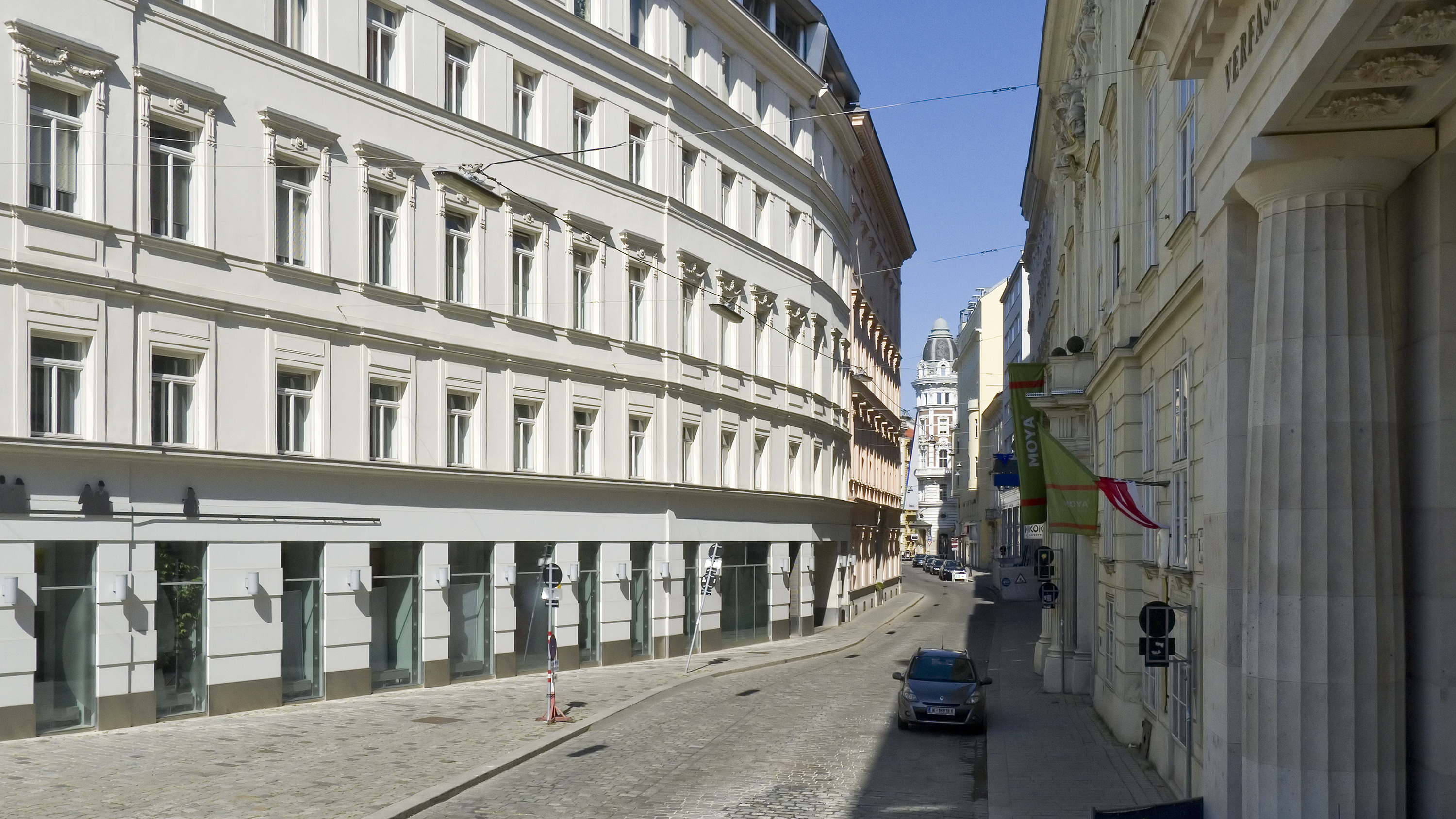 Renngasse in Wien 1 bei Nr. 2 Richtung Nordosten